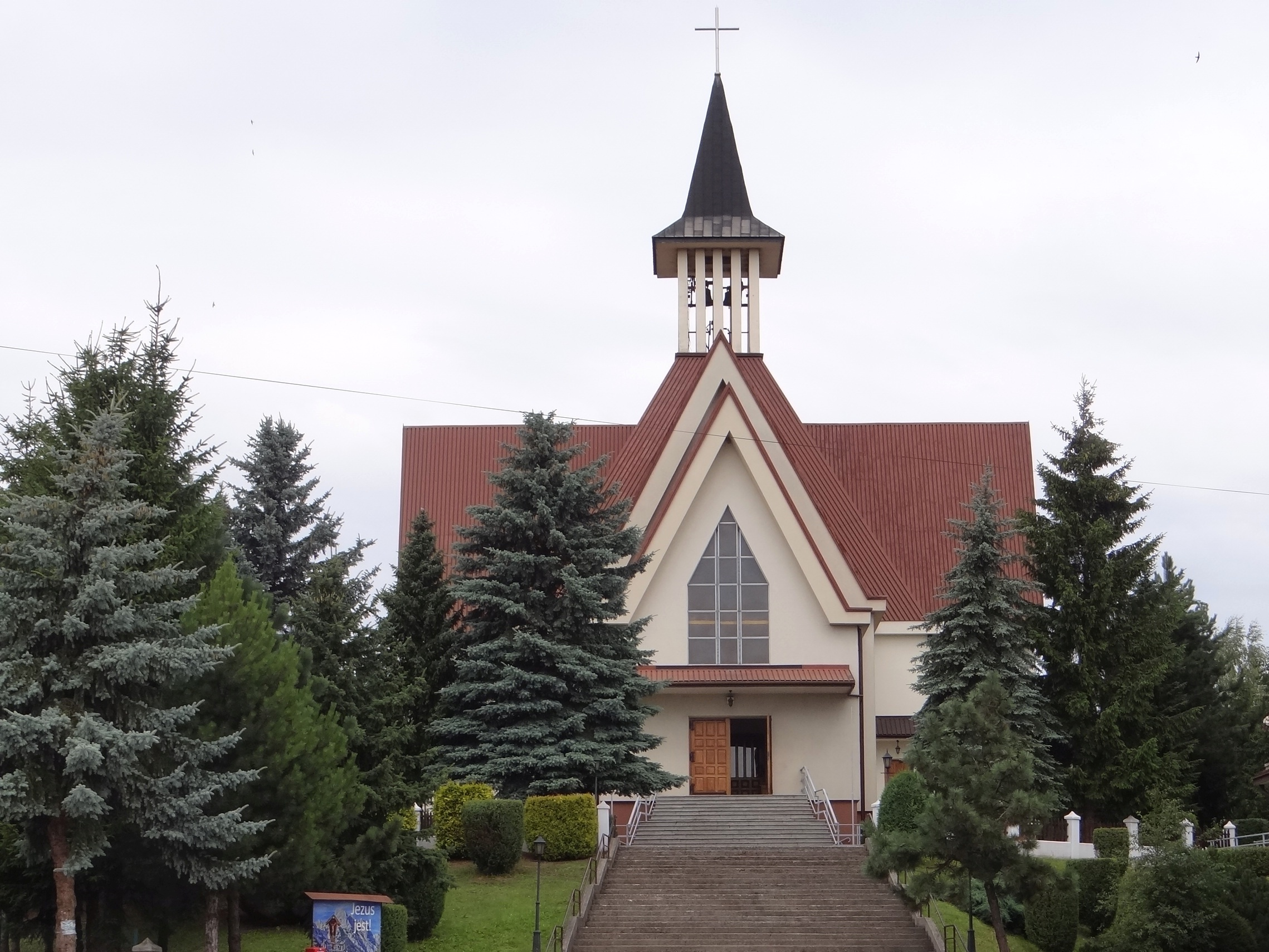 Rzuchowa. Kościól